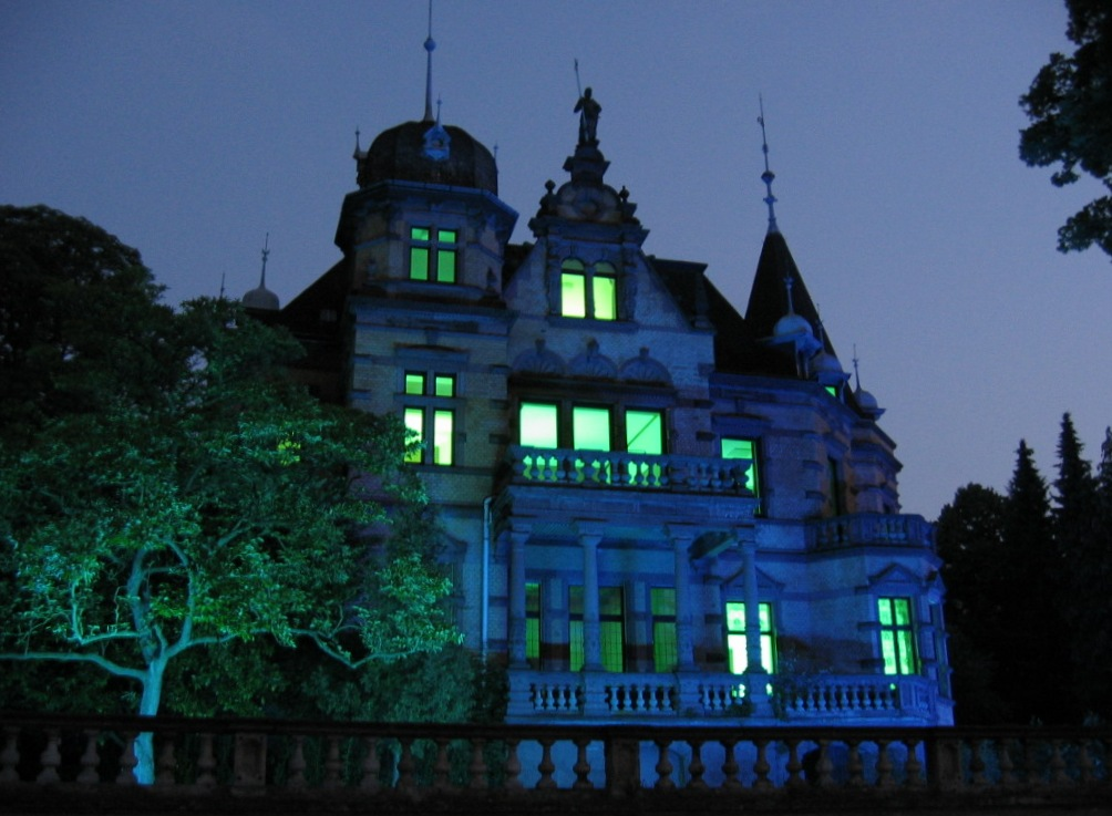 Installative Intervention für die Villa Belgrano von Ingo Bracke. Lichtinstallation. Kunstverein Mittelrhein e.V..